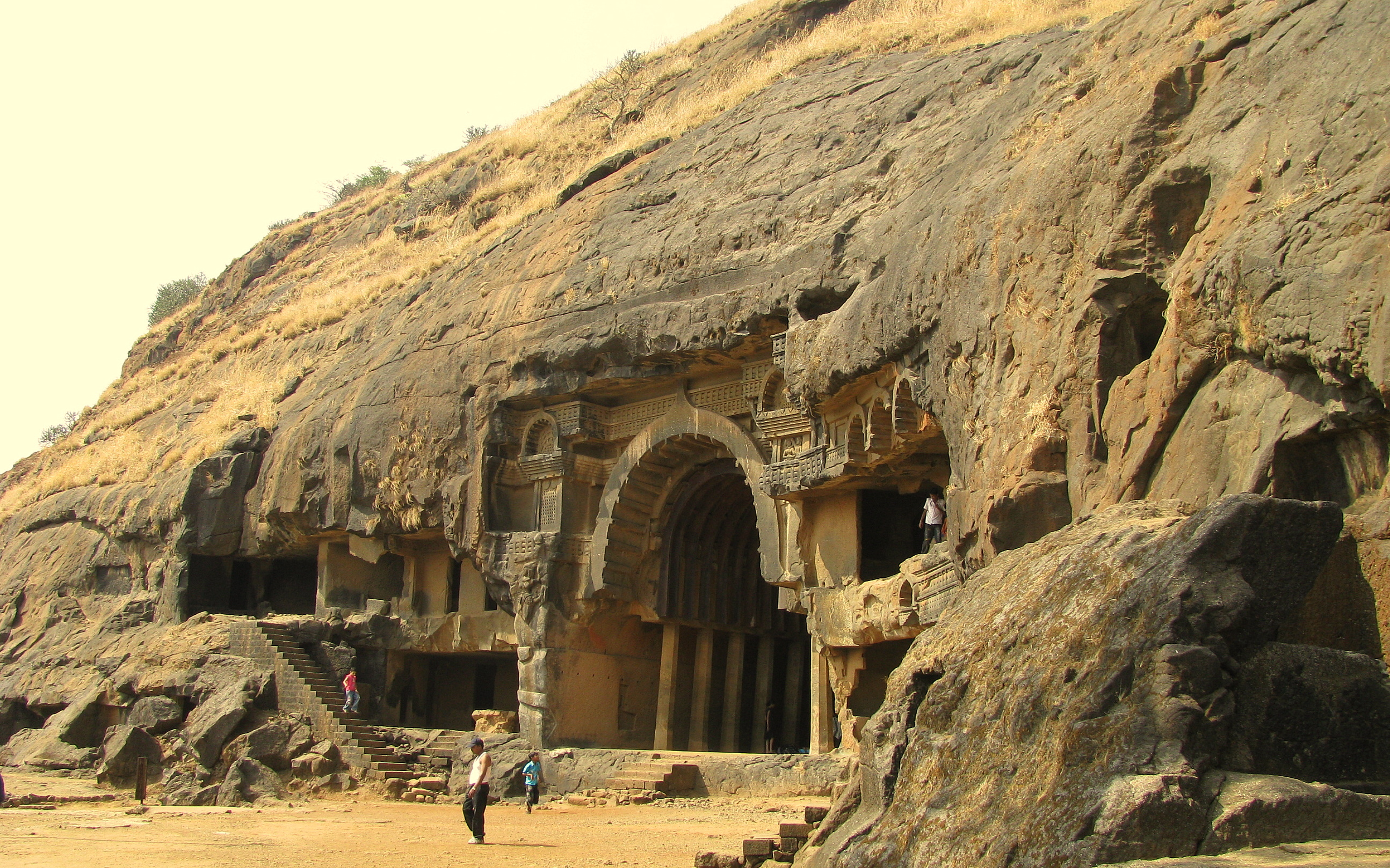 Bhaje caves, Maharashtra